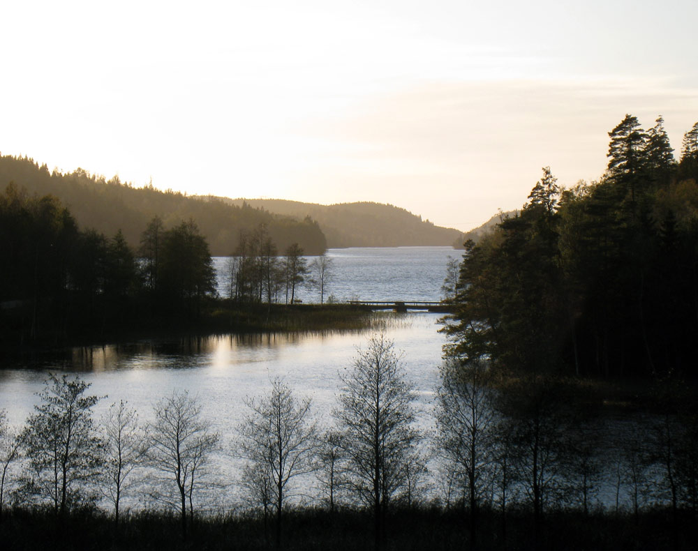 Västra Ingsjön sedd mot väster från Kalvshult